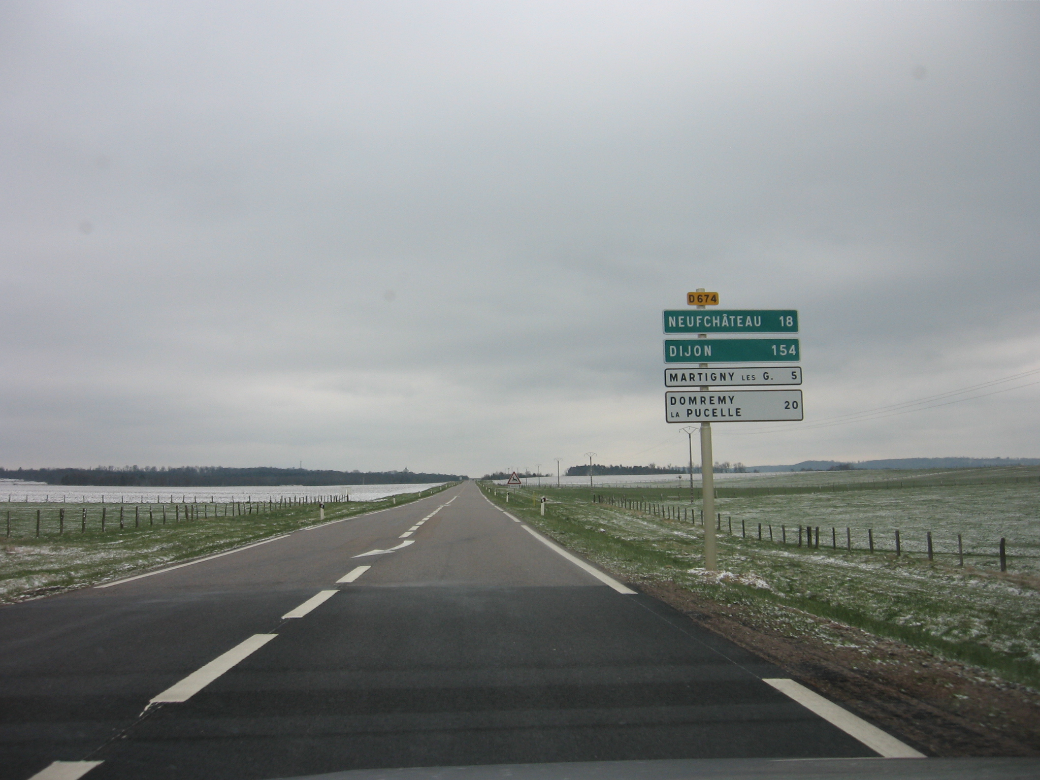 D674 (former N74) near Autreville